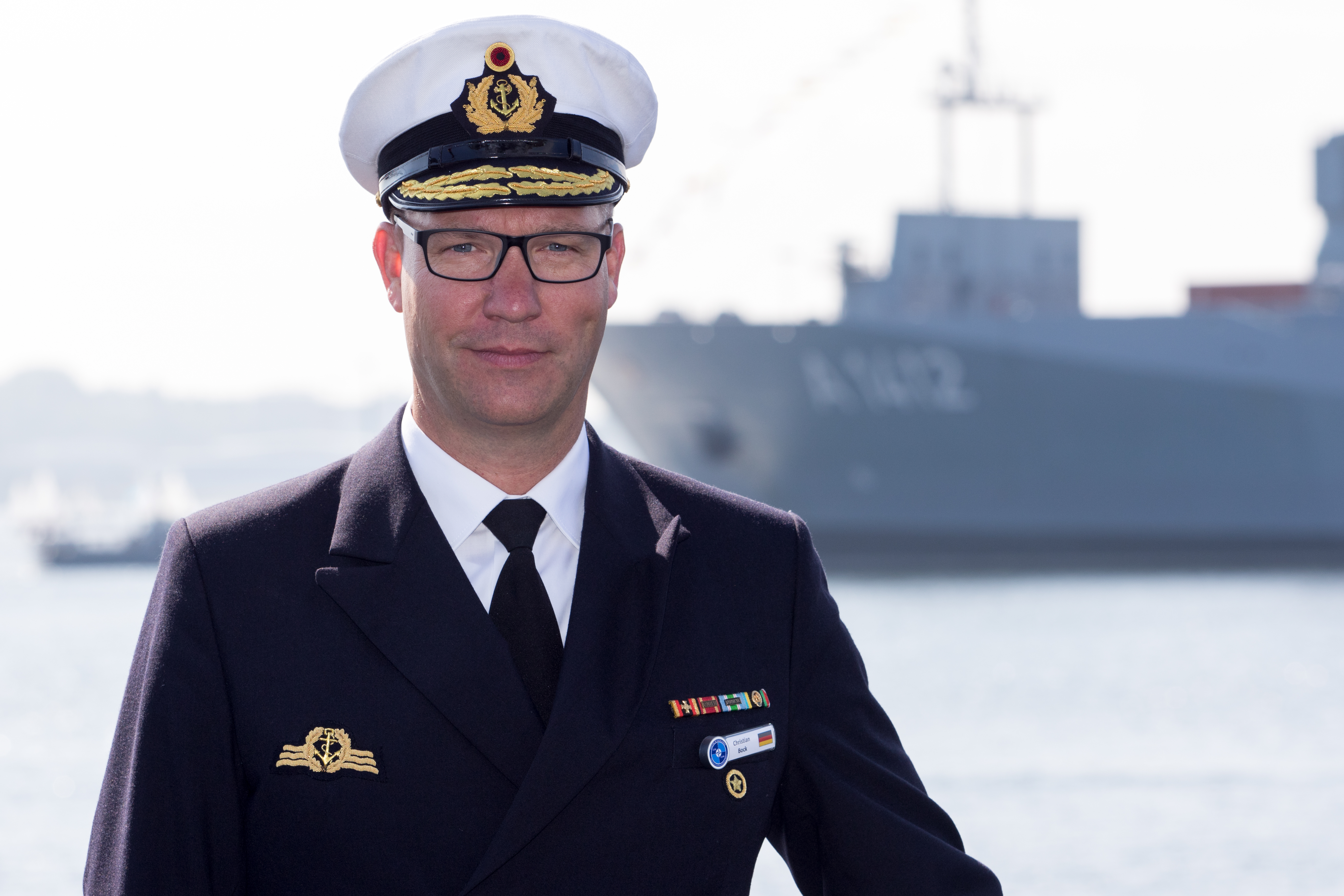 Flottillenadmiral Christian Bock im Marinestützpunkt Kiel